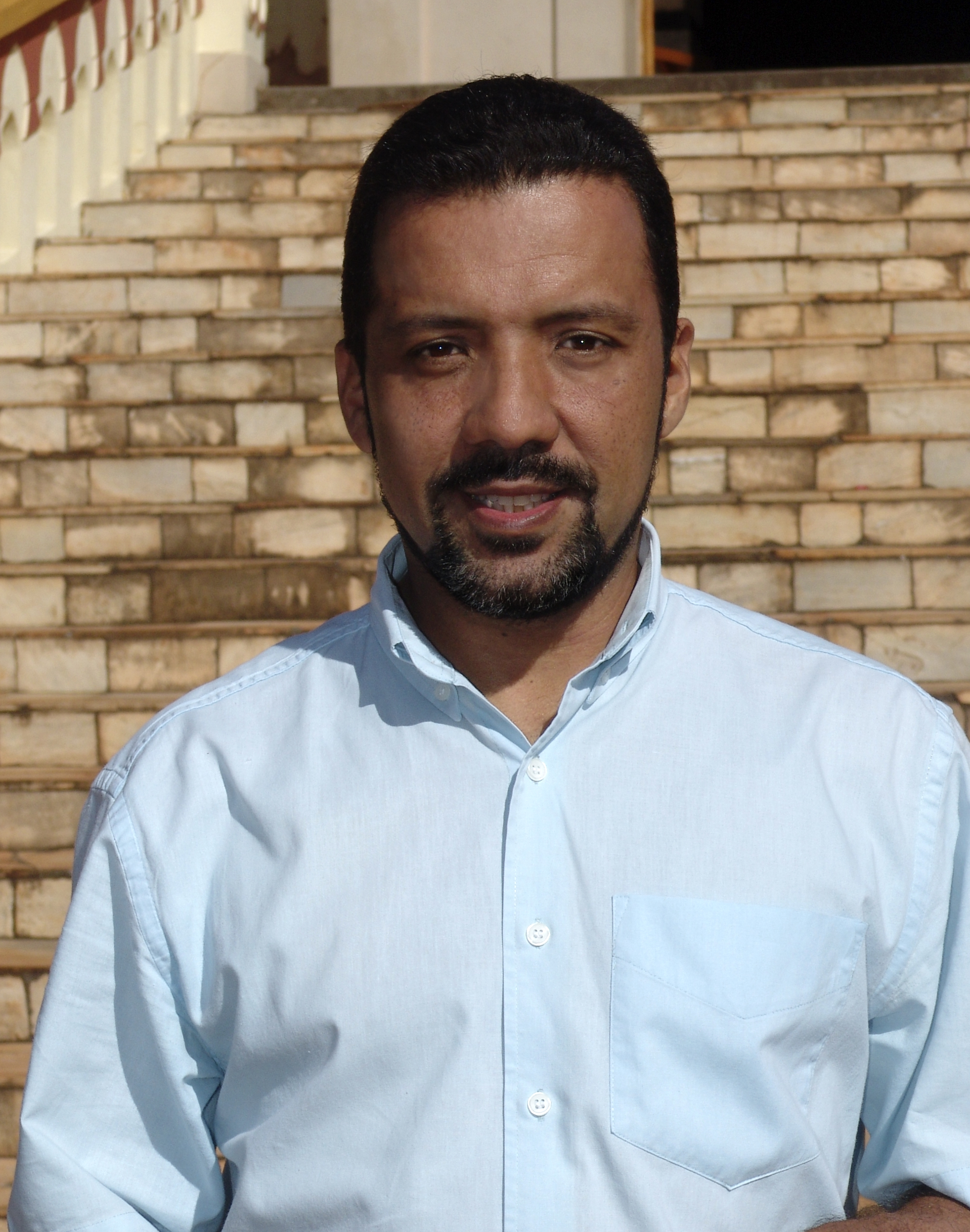 Escritor, jornalista, biógrafo. Gesiel Júnior